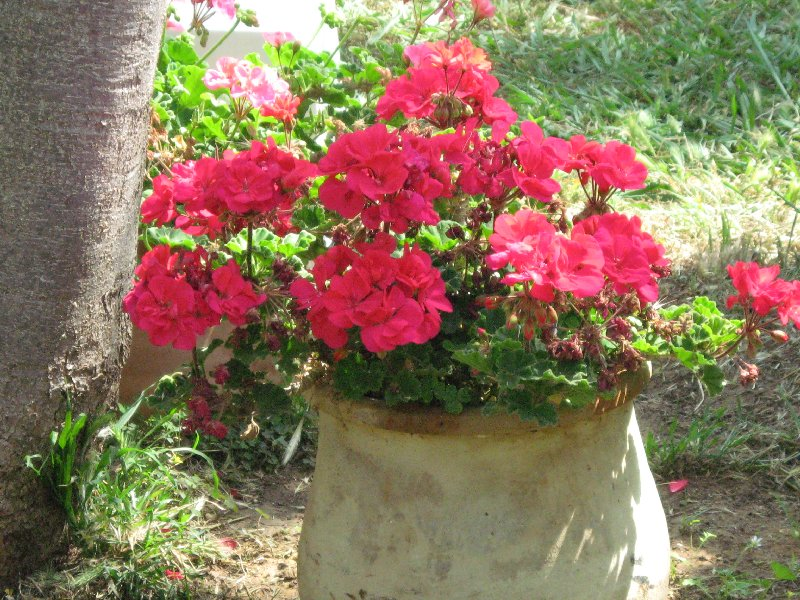 פלרגוניום רישיון נוצר על ידי משתמש:Ymm